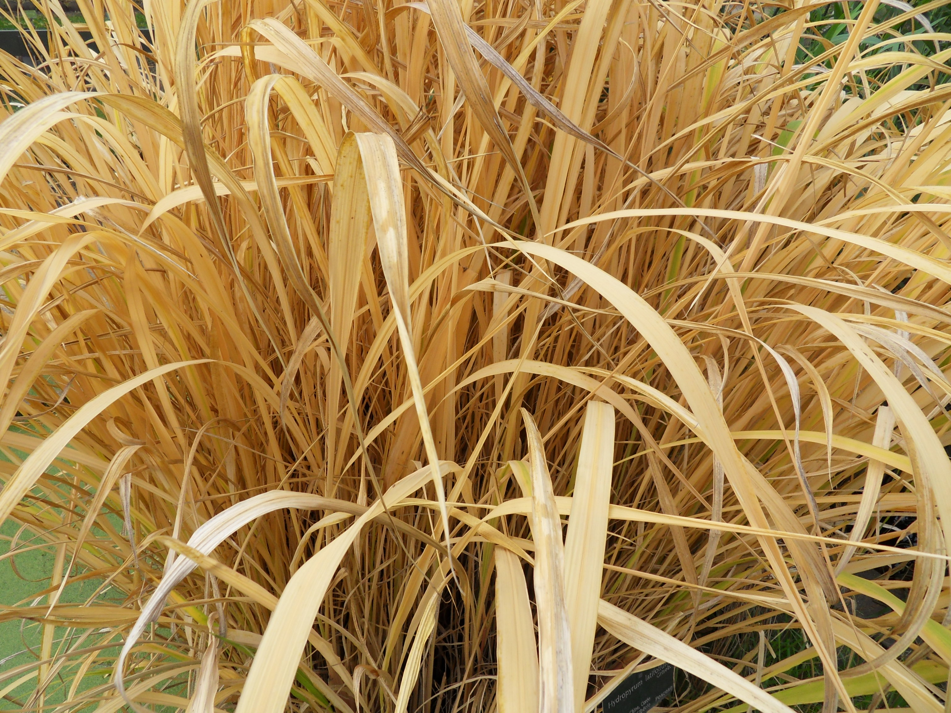 Riz sauvage de Mandchourie Zizania latifolia (Griseb.) au Jardin des Plantes de Paris, feuillage d'automne syn. Hydropyrum latifolium (Griseb.)